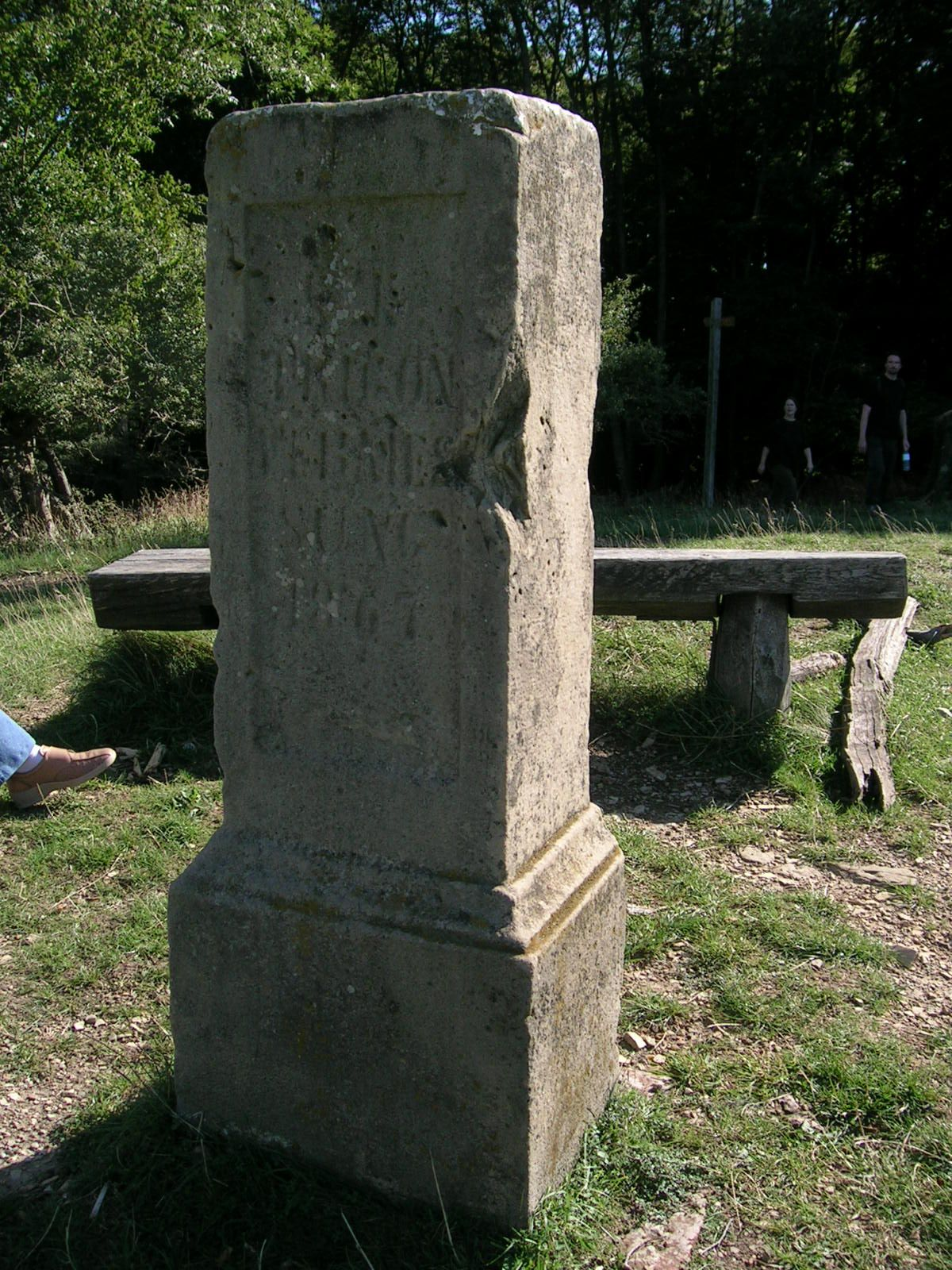 Vermessungepfeiler ("TP", ca. 1860) für das Basisnetz beim Fundamentalpunkt Hermannskogel, geografische Lage: geografische Breite 48°11', Länge ~16°15', Höhe ca. am Ostabfall des Wienerwaldes, westlicher Stadtrand Wiens ("Wienerblick"), Höhe ca. 450m.